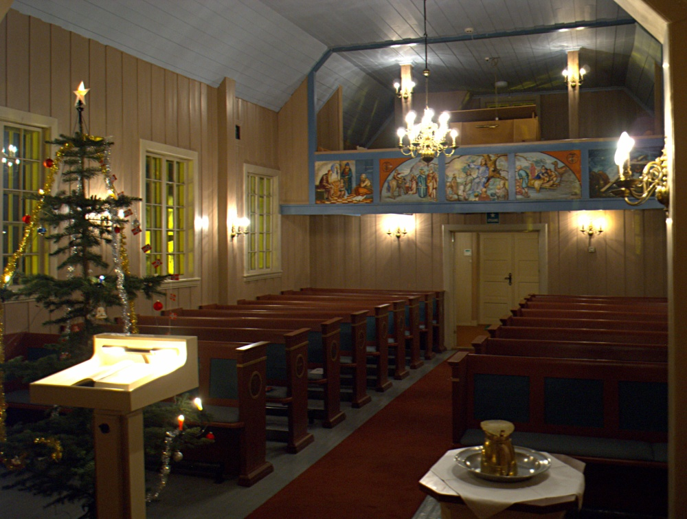 Leirskogen kirke, interiør, kirkeskip.